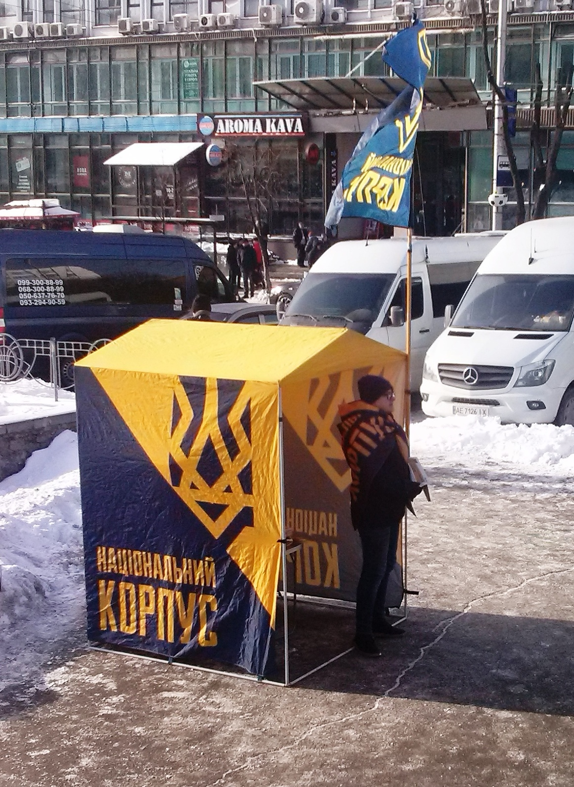 Агітаційний намет Національного корпусу